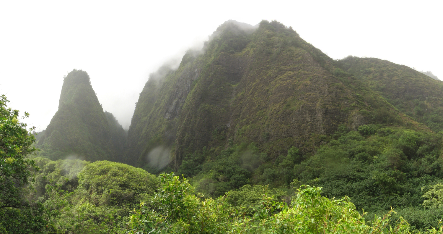 Iao State Park Maui